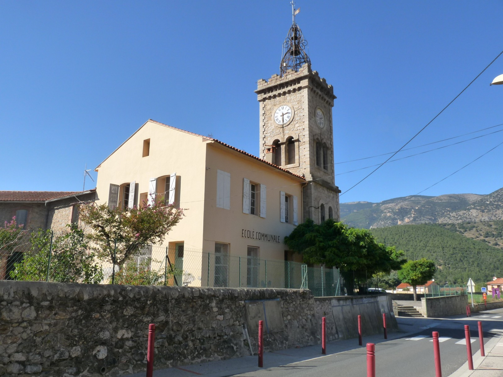 Ecole de Fuilla près de l'ancienne mairie, Pyrénées-Orientales, France